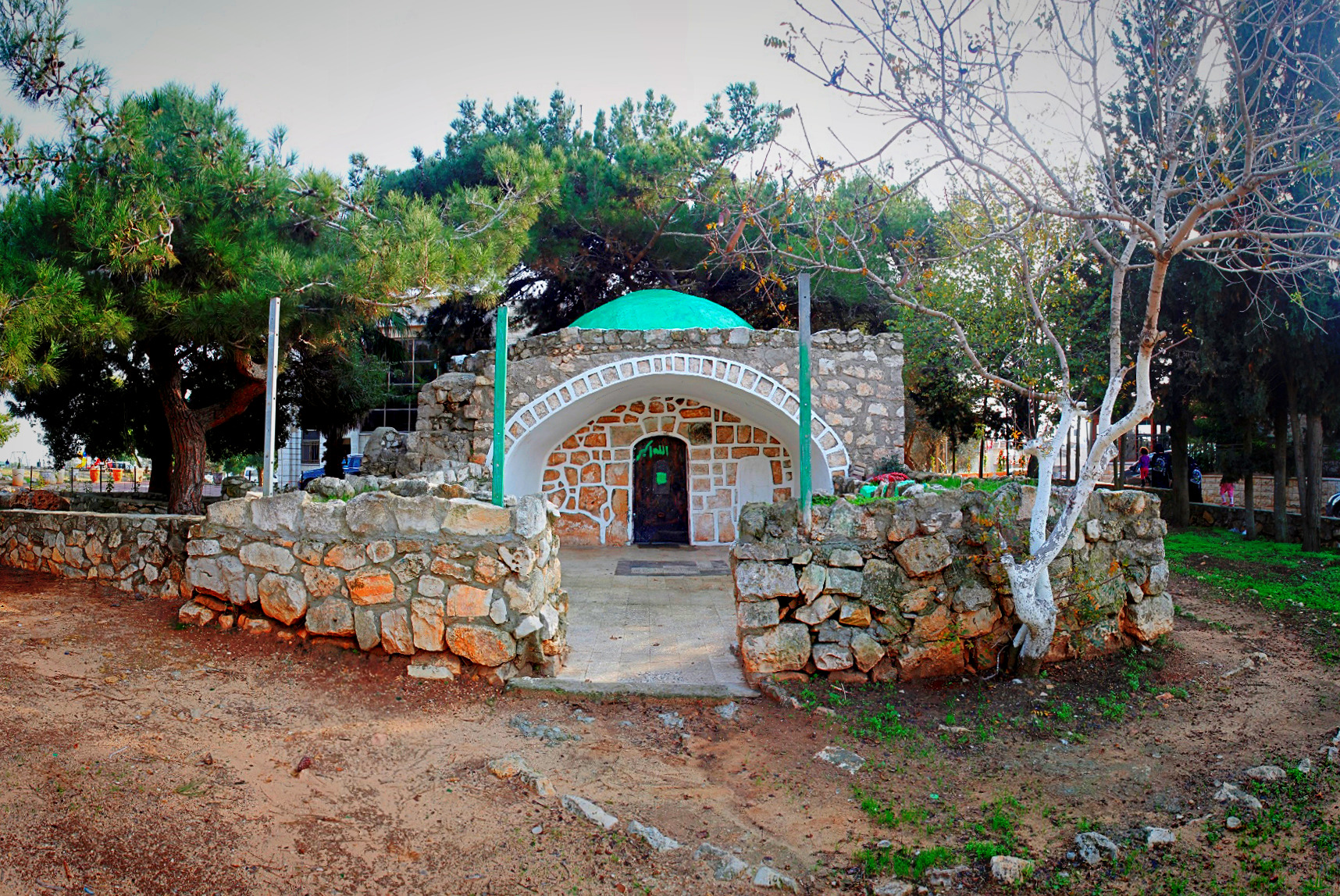 مقام الشيخ إسكندر - ام الفحم